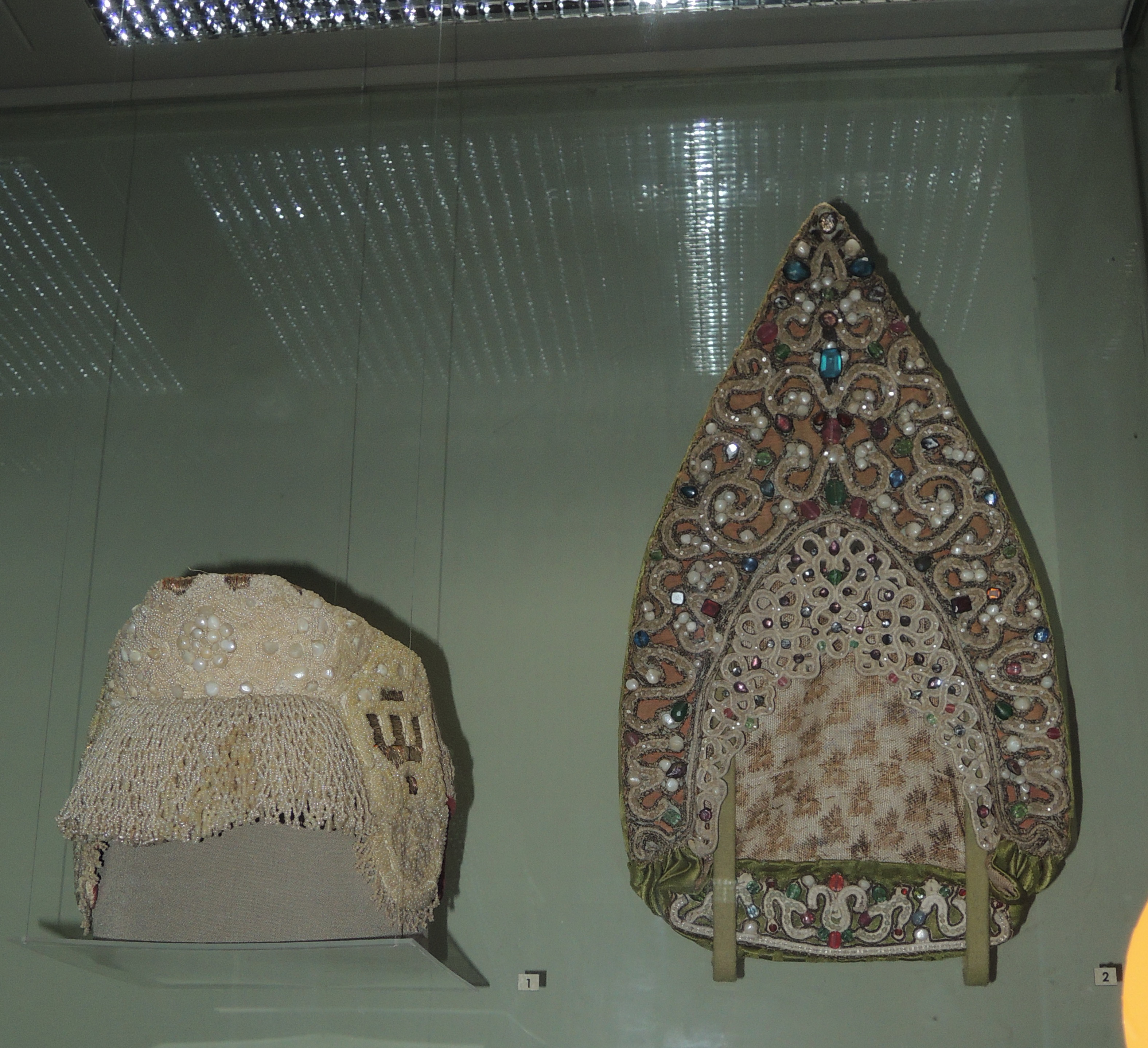 1. Кокошник. Каргопольский уезд Олонецкой губернии. 18 век. Полотно, речной жемчуг, перламутр, бисер, золотные нити, галун. ГИМ 2. Кокошник "наклон". Костромская губерния, конец 18 века. Шелк, шнур, картон, рубленый перламутр, стекло, металл, низанье. ГИМ